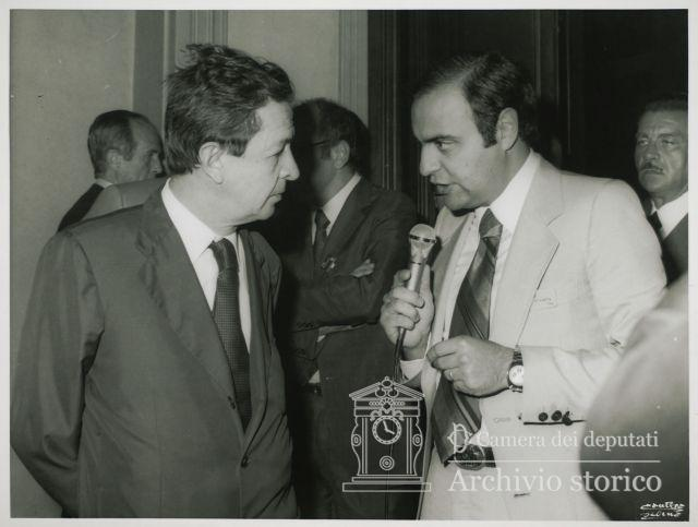 Giuramento del Presidente della Repubblica Sandro Pertini, il giornalista Bruno Vespa intervista Enrico Berlinguer